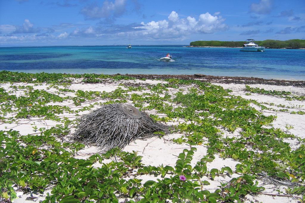 Débarquement sur une des deux iles de Petite Terre